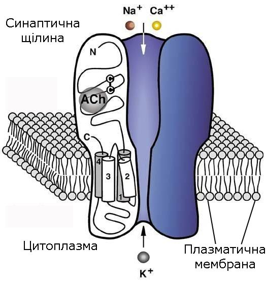 N-ACh receptor-scheme.jpg: Схематичне зображення нікотинового ацетилхолінового рецептору